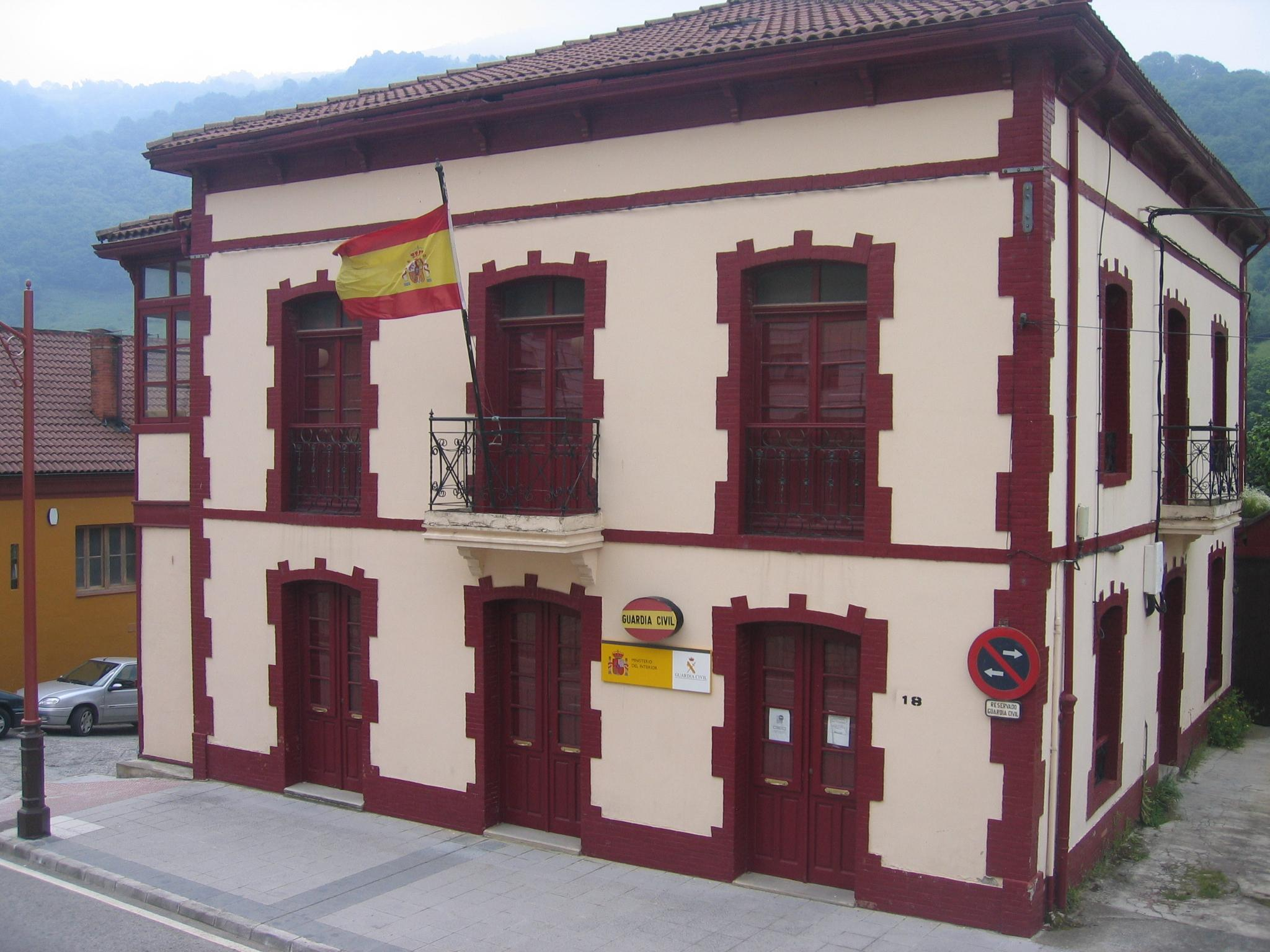 Fotografía del Cuartel de la Guardia Civil en la localidad de Bárzana.